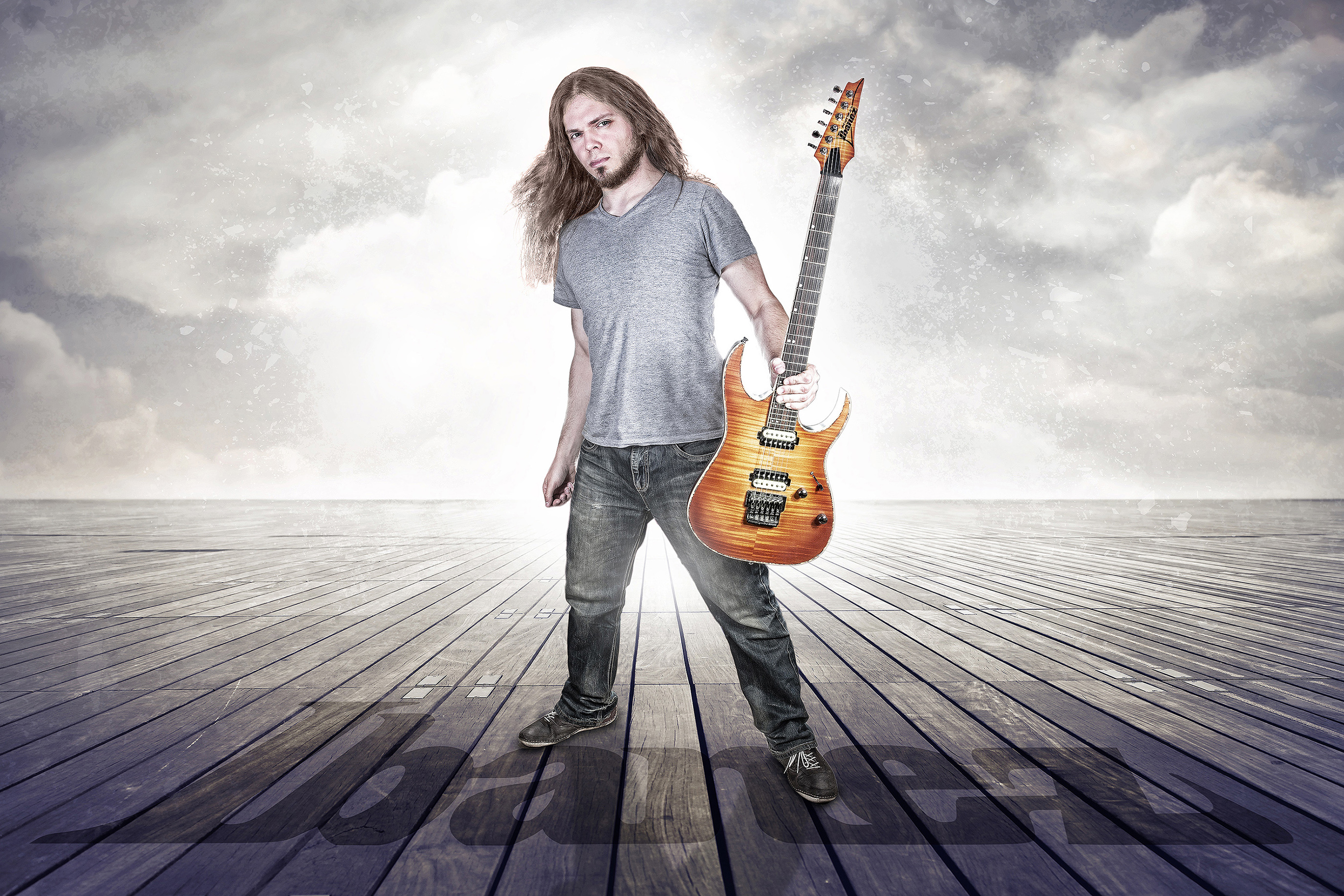 Michael Liewald Promobild 2018